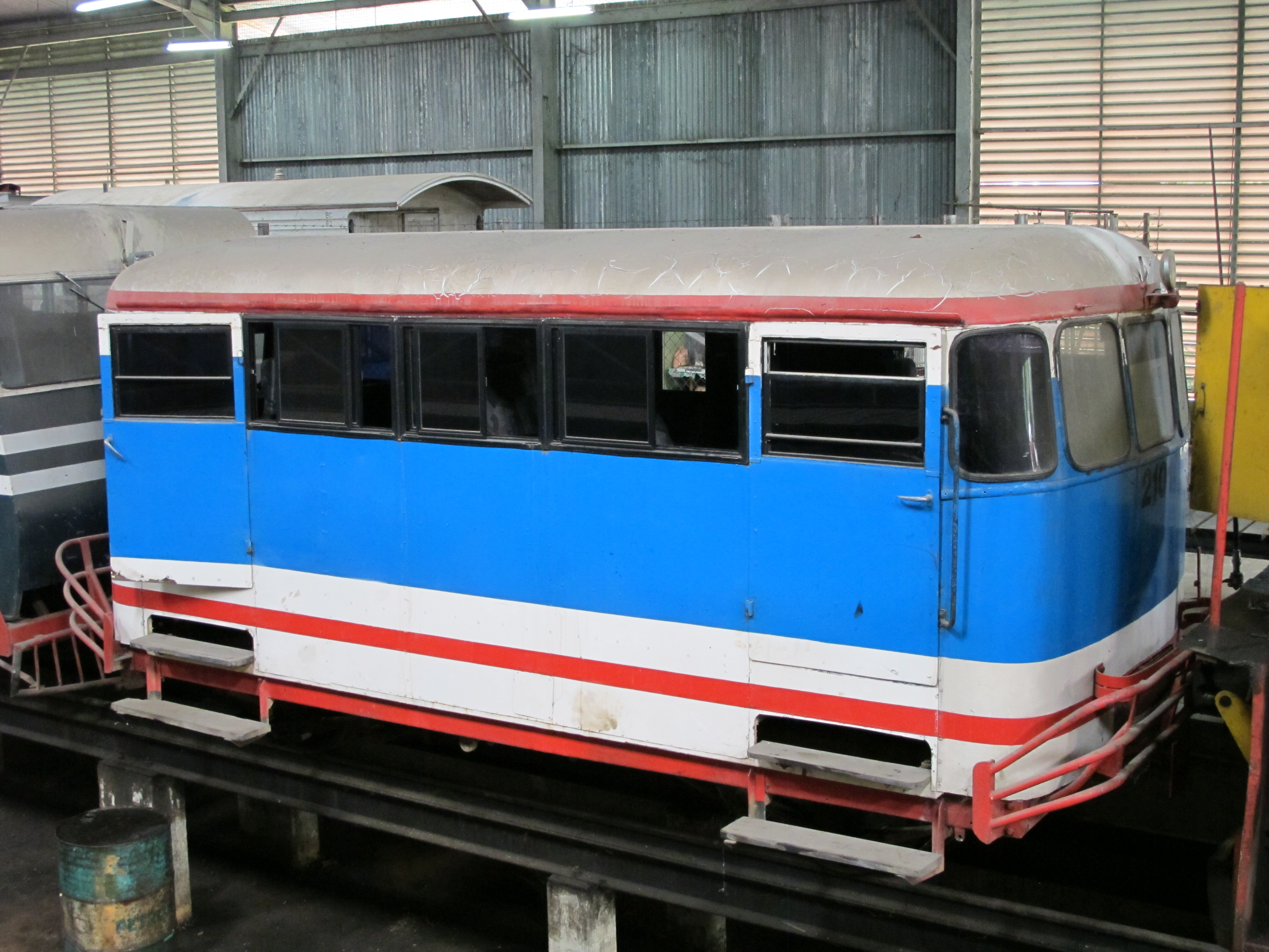 North Borneo Railways Schienenbus aus der Kolonialzeit